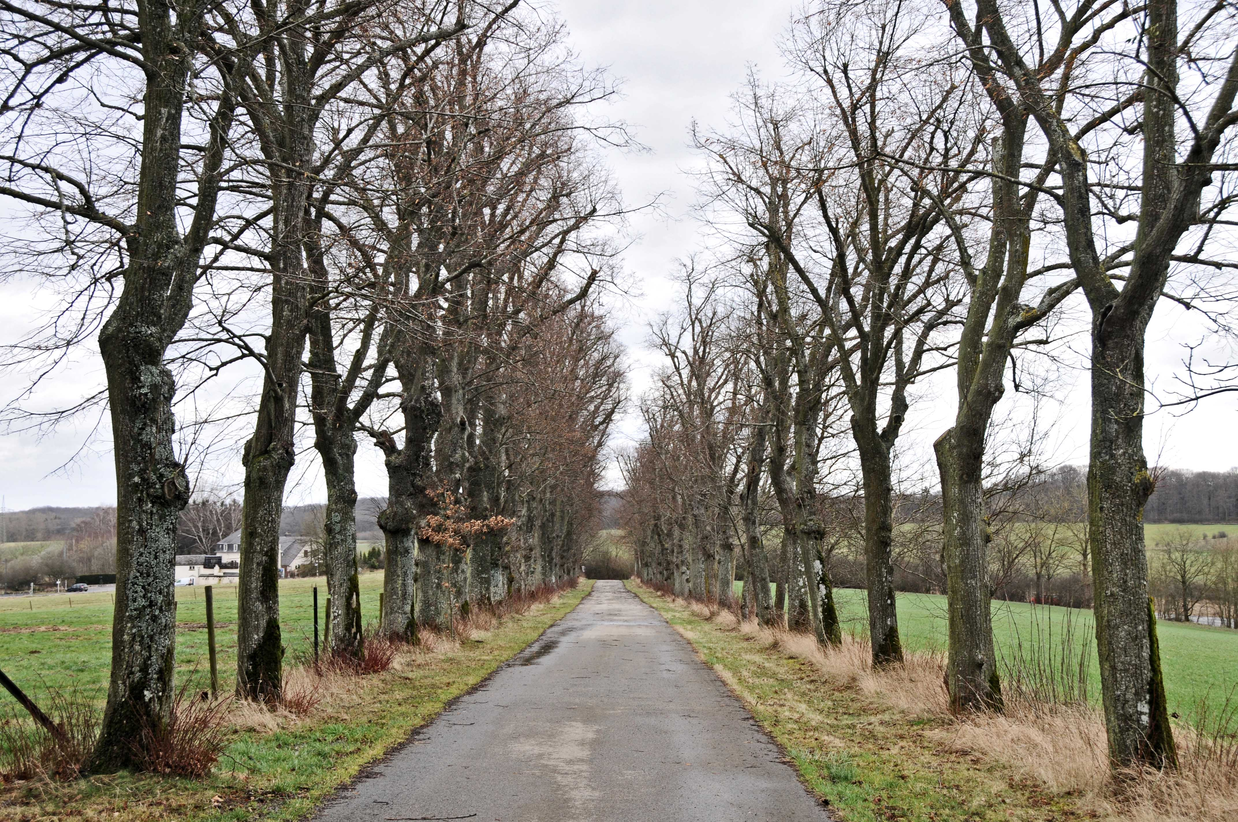 Lannenallee um Gréiwelshaff.